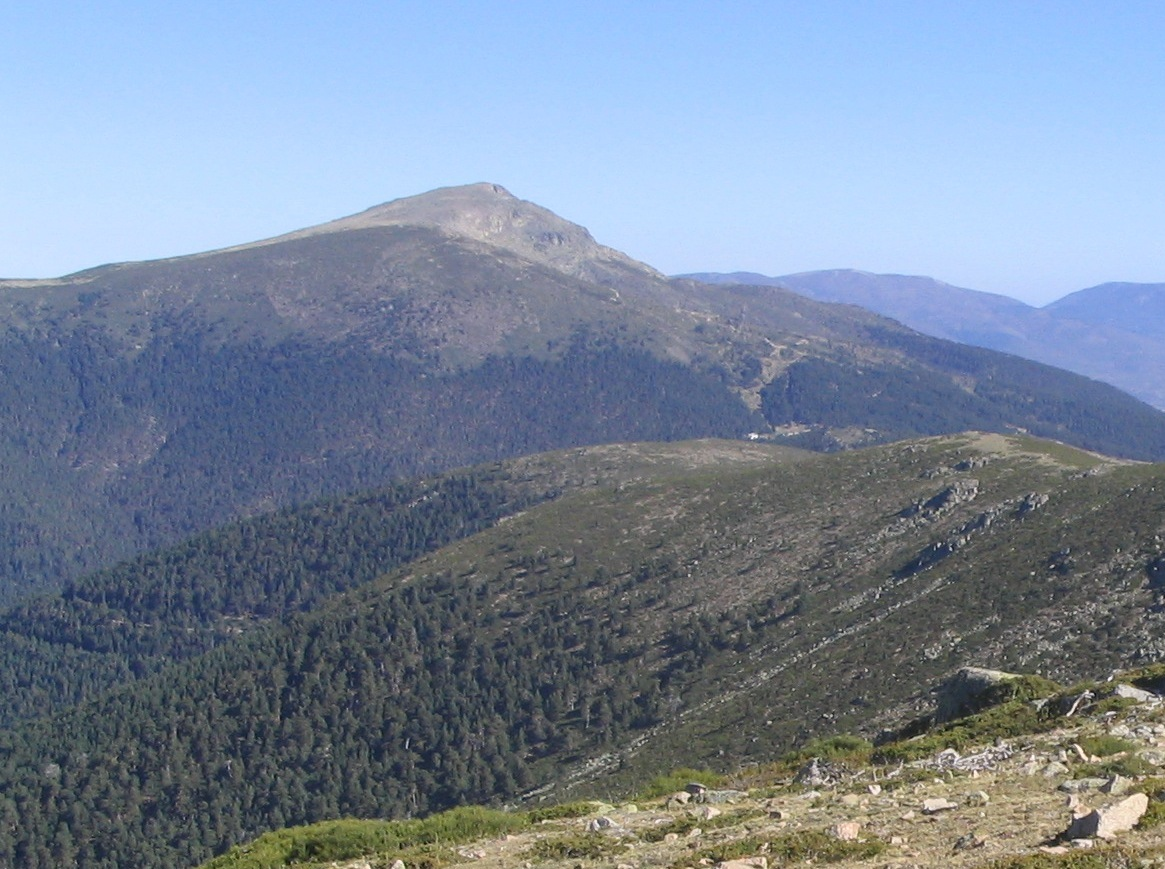 Vista del pico de Peñalara desde la Bola del Mundo (Sierra de Guadarrama), España.